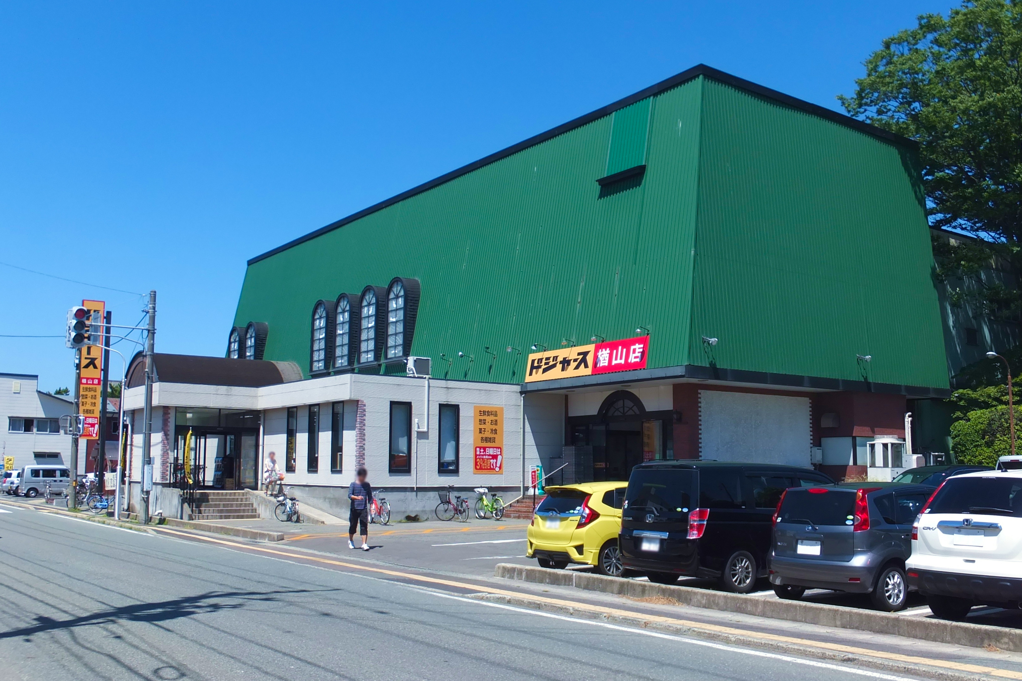 ドジャース楢山店（秋田市南通築地）